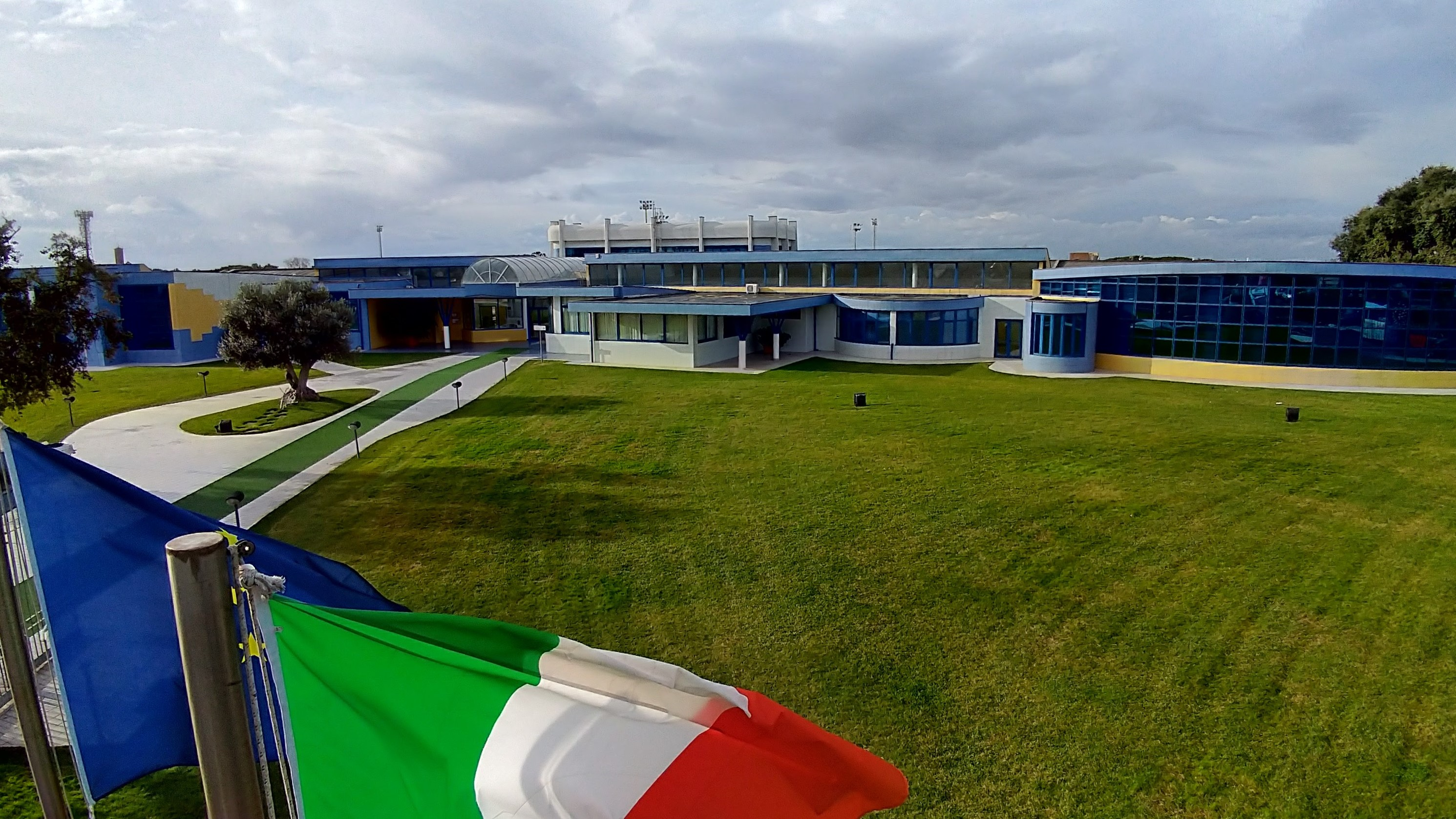 Panoramica del Liceo Chris Cappell College di Anzio